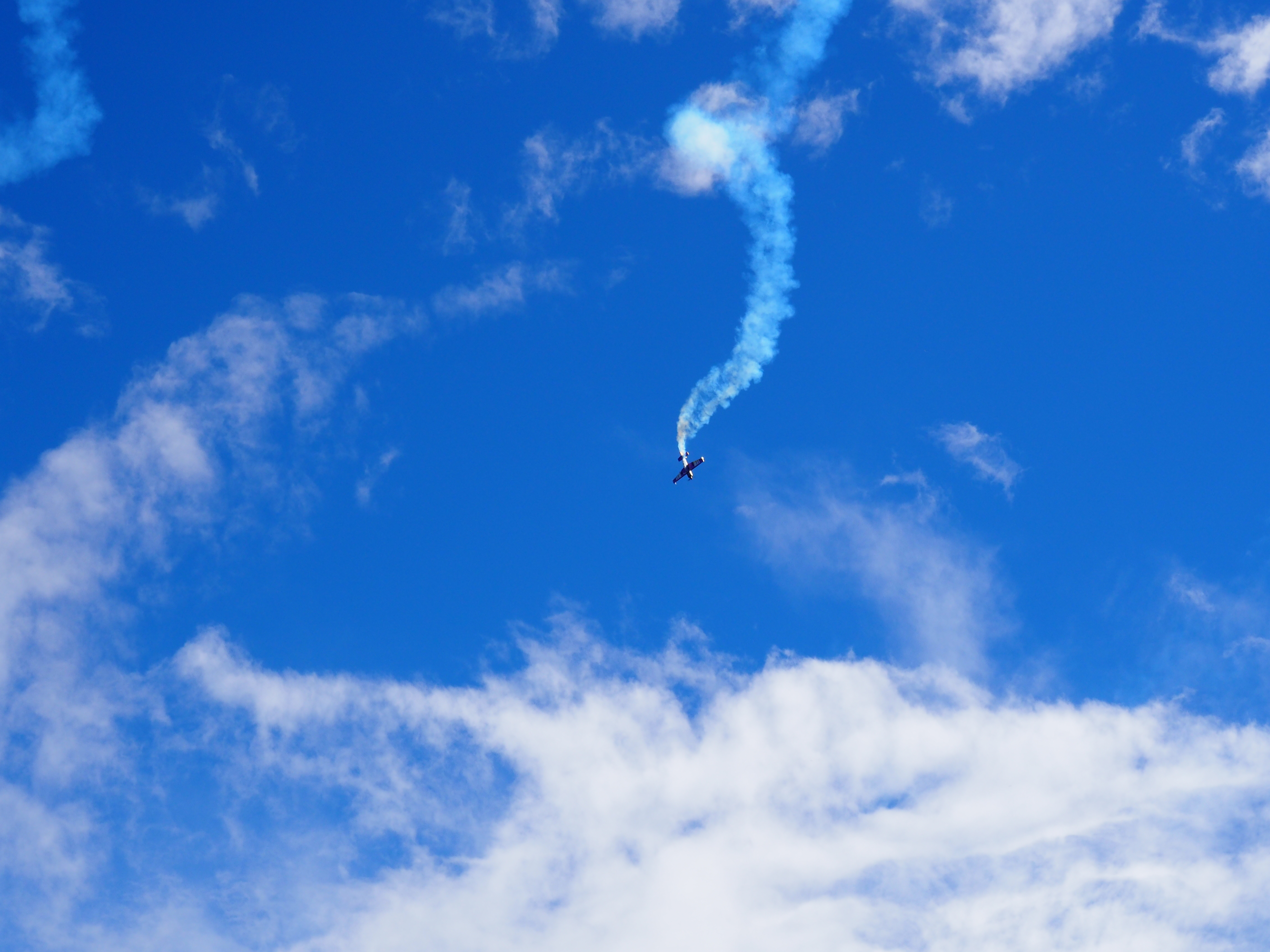 Spectacle de voltige aérienne au spectacle aérien international de Bagotville en 2017.